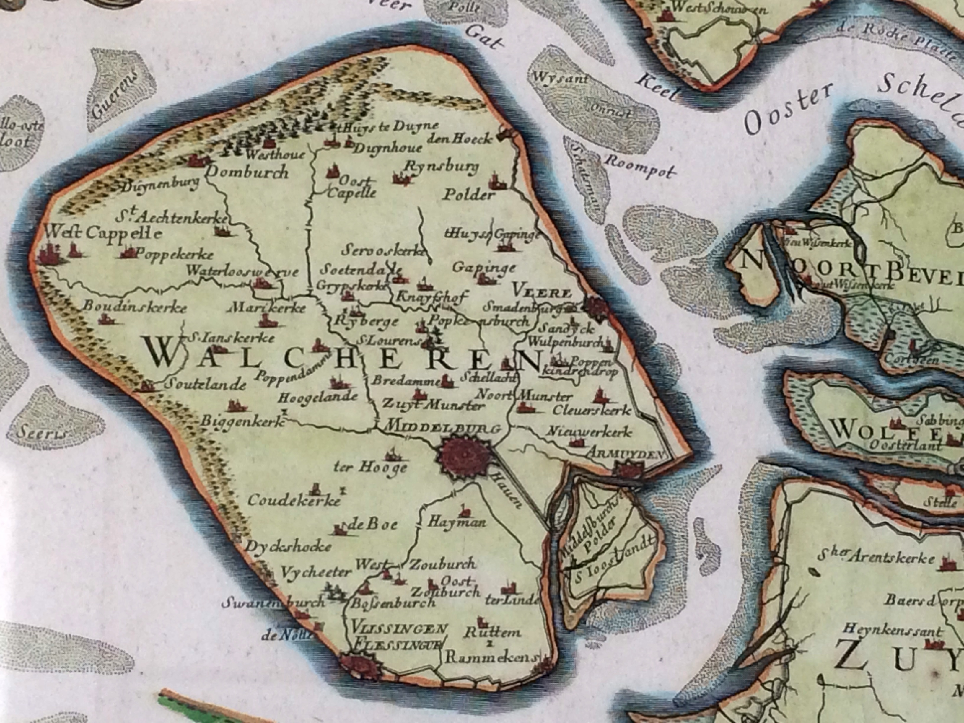 L'île de Walcheren dans "Le Comté de Zeelande", carte dressée par Nicolas Sanson et imprimée à Paris chez H. Jaillot en 1681.